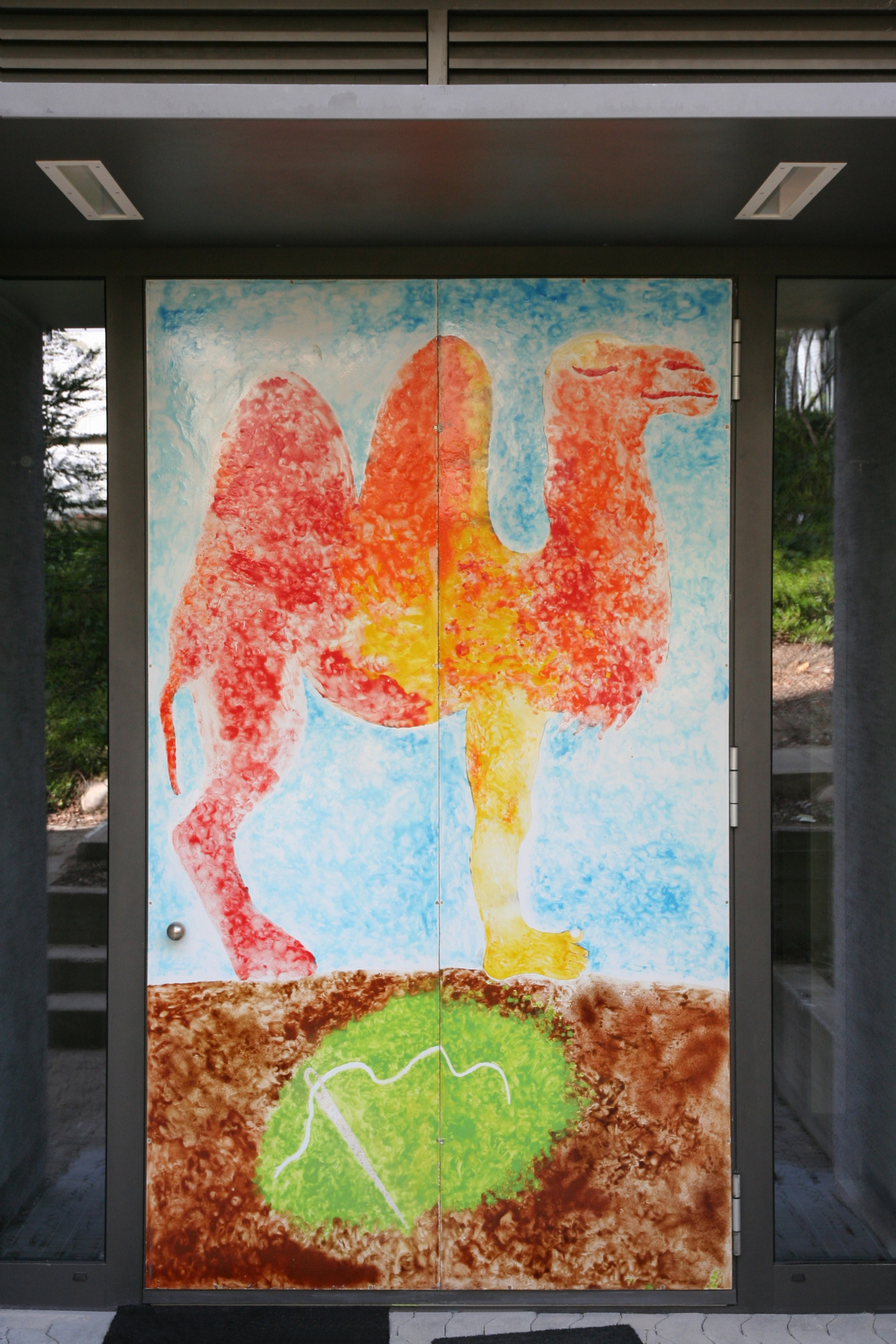 Römisch-katholische Pfarrkirche St. Martin Zürich-Fluntern, Türe mit Emailarbeit von Max Rüedi